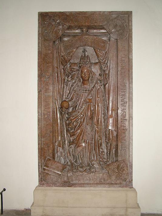 Grab der Eleonore von Portugal Falsche Zuordnung, das Bild zeigt das Grab der deutschen Kaiserin Eleonore, geborene Prinzessin von Portugal,Tochter Duartes I und Schwester Affonsos V., Ehefrau Kaiser Friedrichs III.